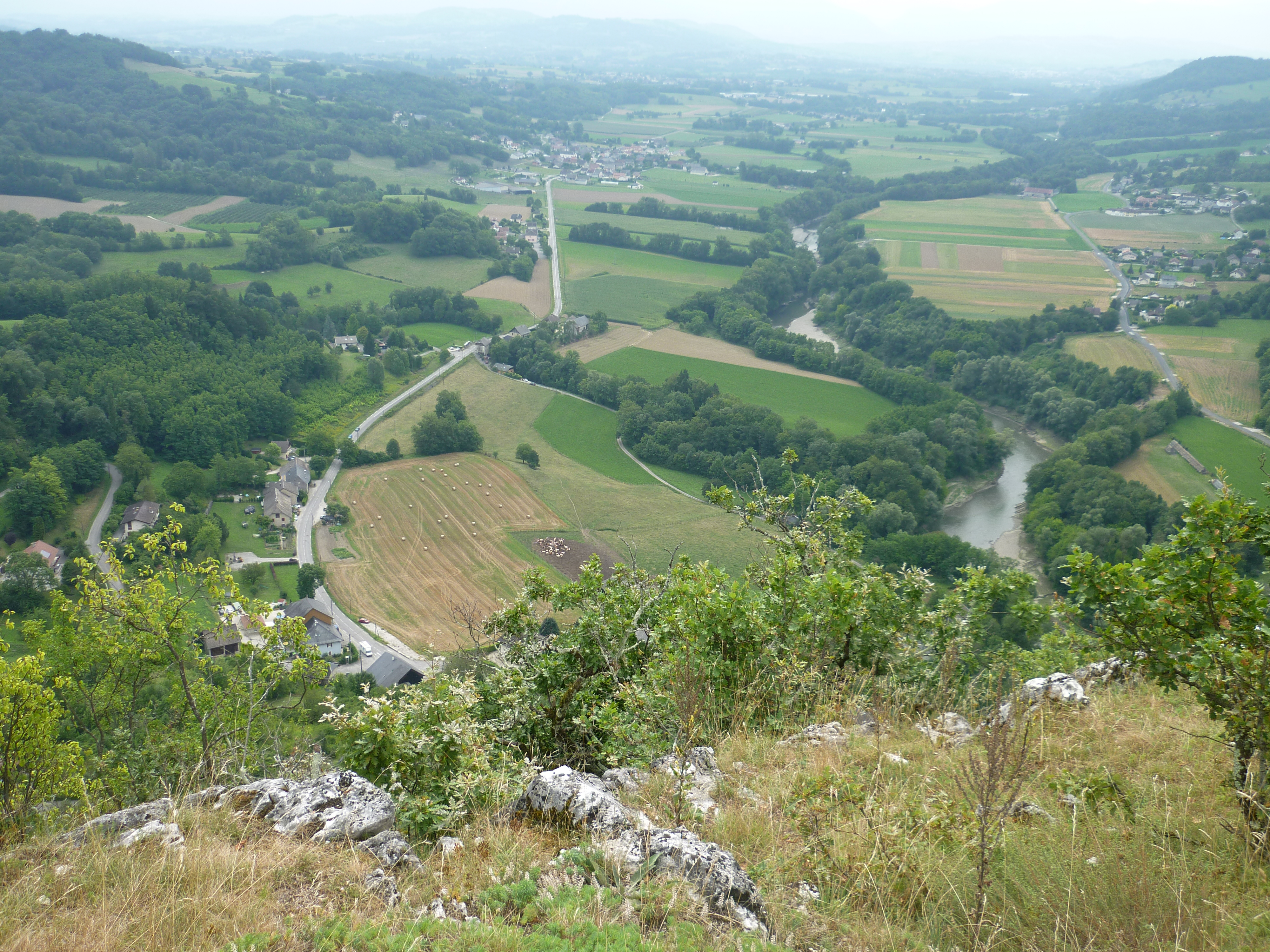 Val de Fier (Haute-Savoie, France) vu de la croix de Chavannes